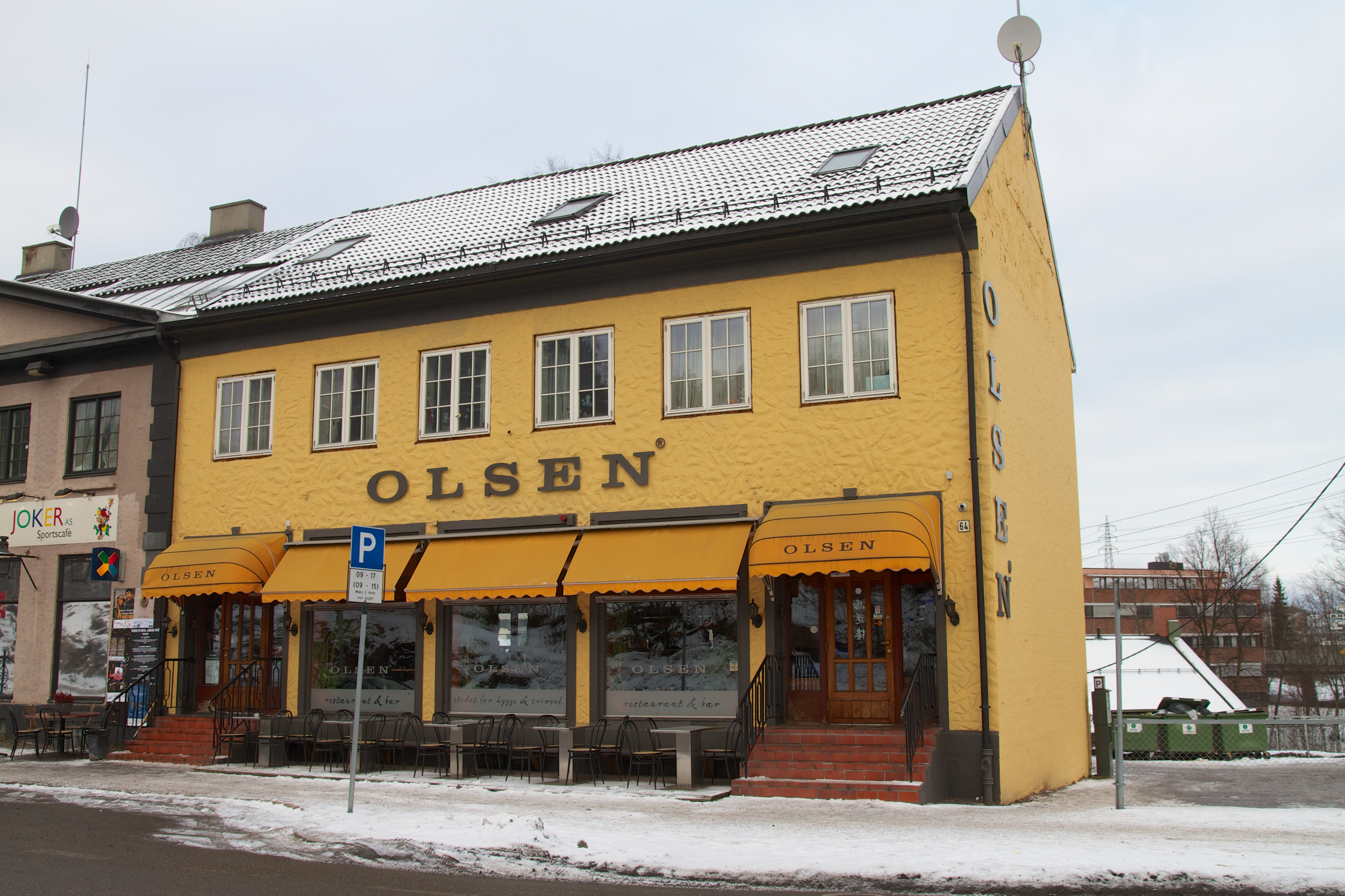 Østensjøveien 64 på Bryn i Oslo.